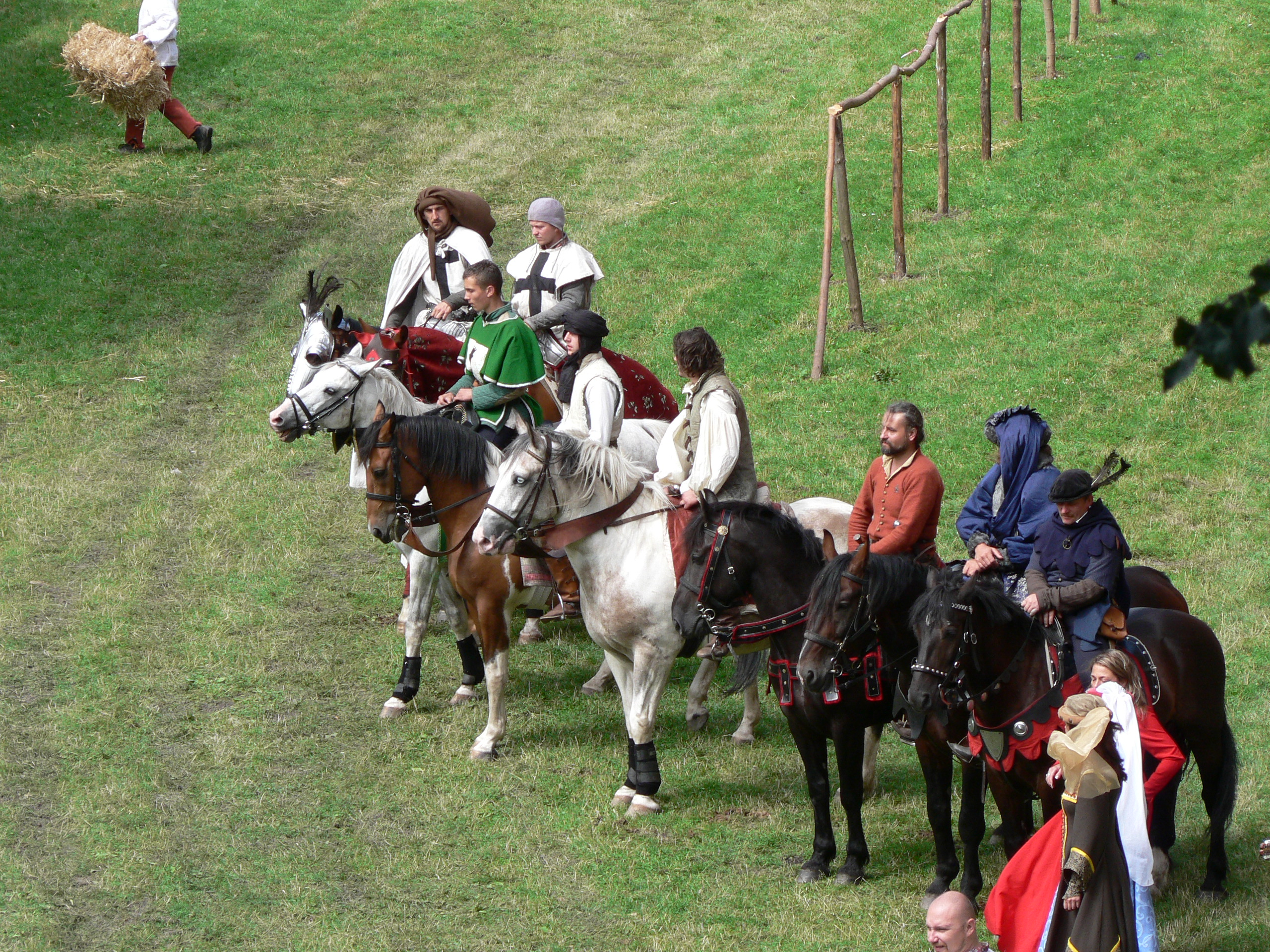 Knights in Malbork Castle. / Rekonstrukcja oblężenia Malborka w 1410 r.